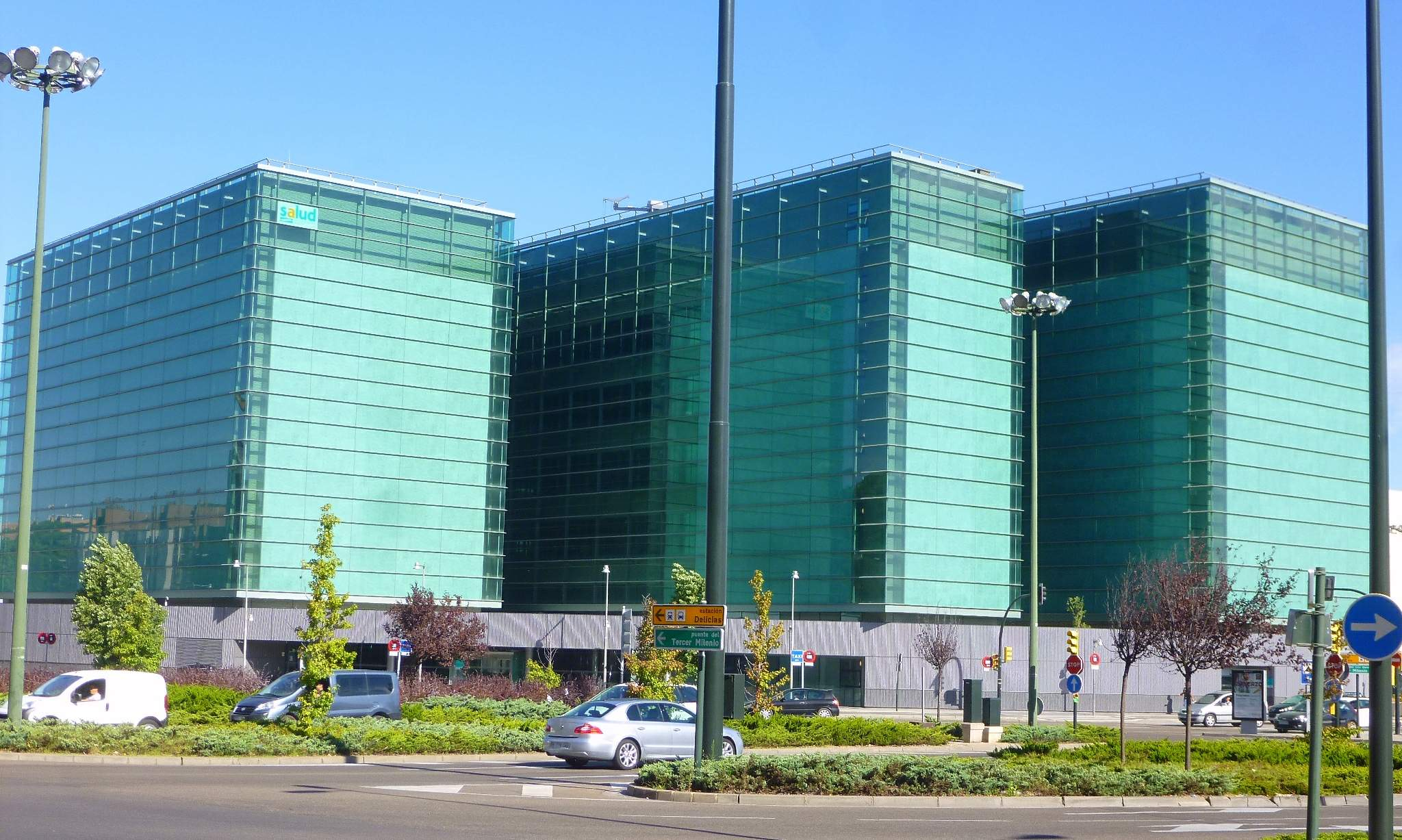 Zaragoza - Centro de Especialidades Médicas Inocencio Jiménez (Servicio Aragonés de Salud)